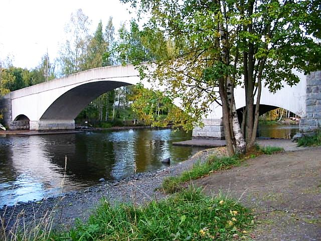 Mierolan silta; museosilta Hattulassa